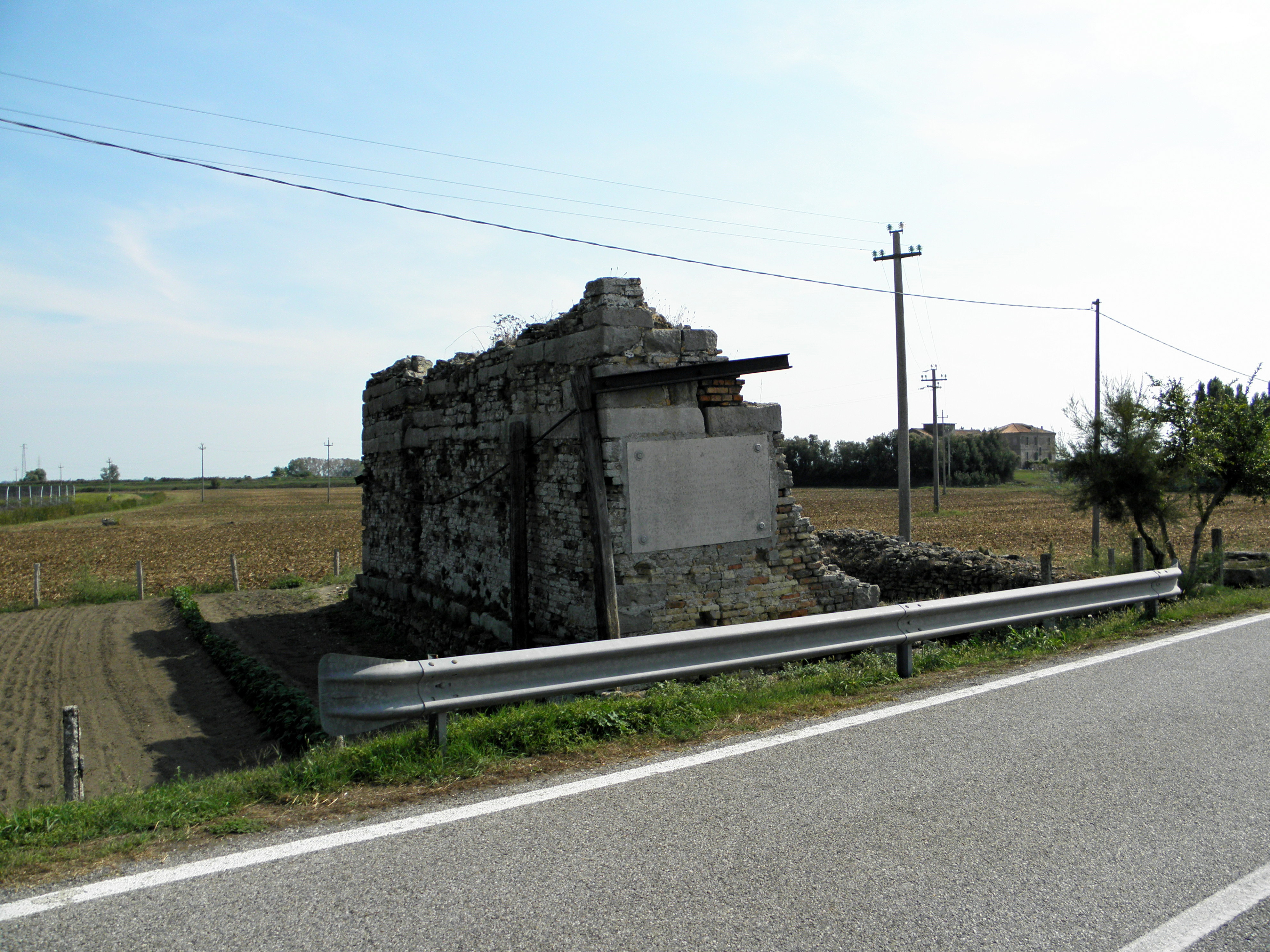 Cà Bianca, frazione di Chioggia: i ruderi della Torre di Bebe (o Torre delle Bebbe).